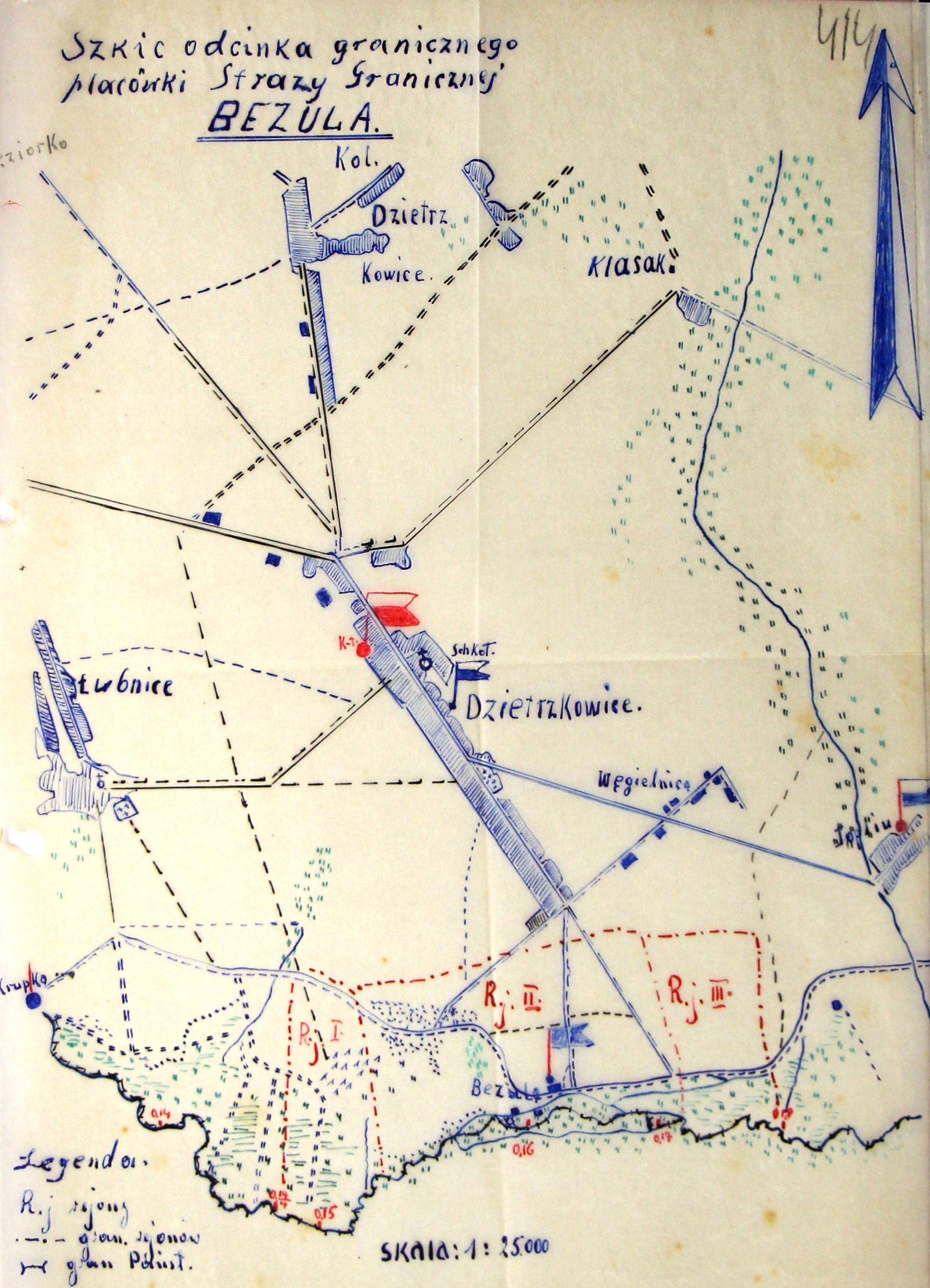 Szkic placówki SG Bezula - lata 30. XX wieku